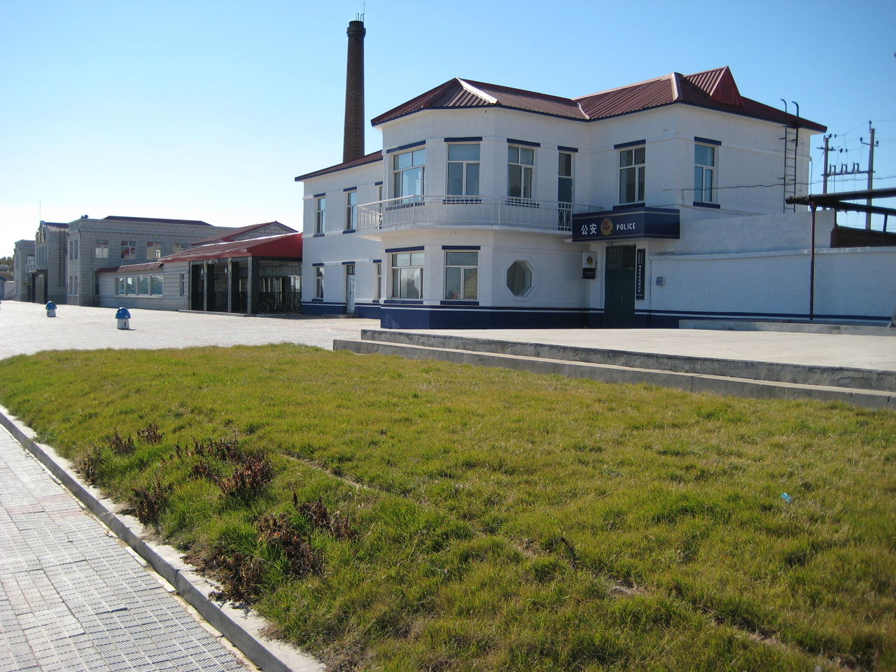 榆树屯站区 QQ696847